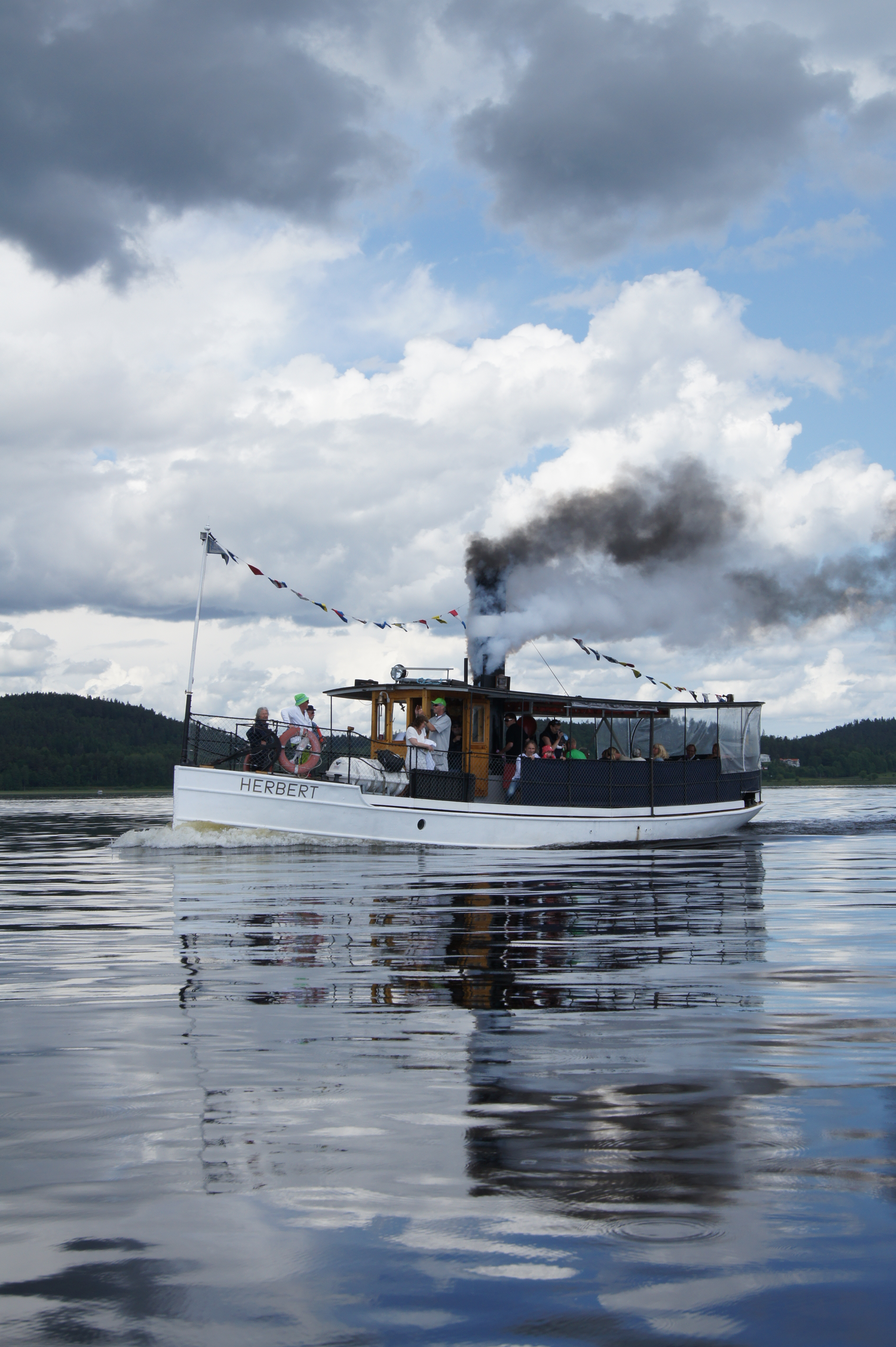 Ångbogserbåten S/S Herbert på sjön Mjörn